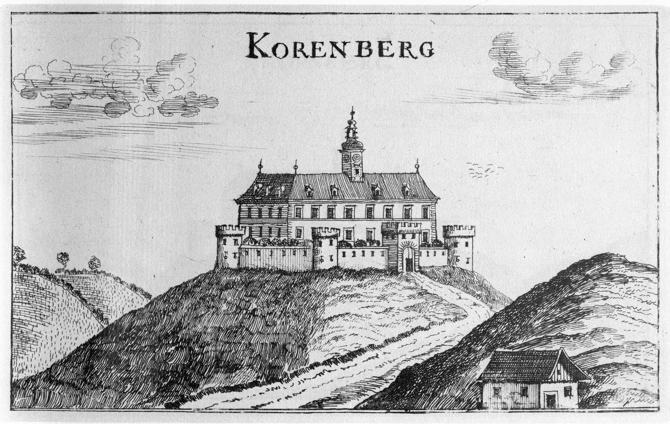 G. M. Vischers Käyserlichen Geographi, Topographia Ducatus Stiriae, Das ist: Eigentliche Delineation / und Abbildung aller Städte / Schlösser / Marcktfleck / Lustgärten / Probsteyen / Stiffter / Clöster und Kirchen / so es sich im Herzogthumb Steyrmarck befinden; Und anjetzo Umb einen billichen Preyß zu finden seynd Bey Johann Bitsch Universitäts Buchhandlern / Auff dem Juden=Platz bey der guldenen Saulen. Graz 1681 Die Nummerierung der Dateien folgt der alphabetischen Reihung der Ortsnamen